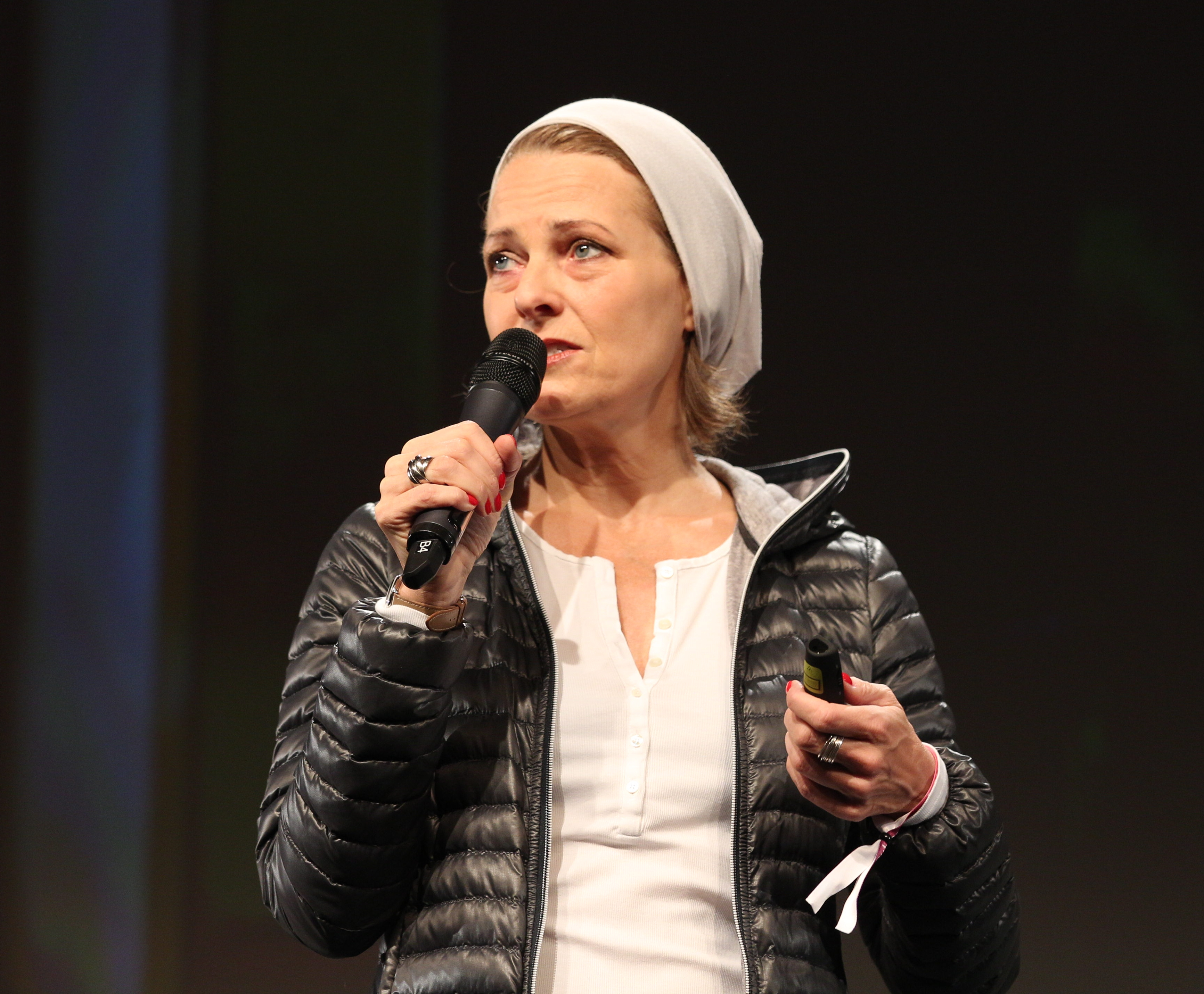 Miriam Meckel (Kommunikationswissenschaftlerin) auf der re:publica 17